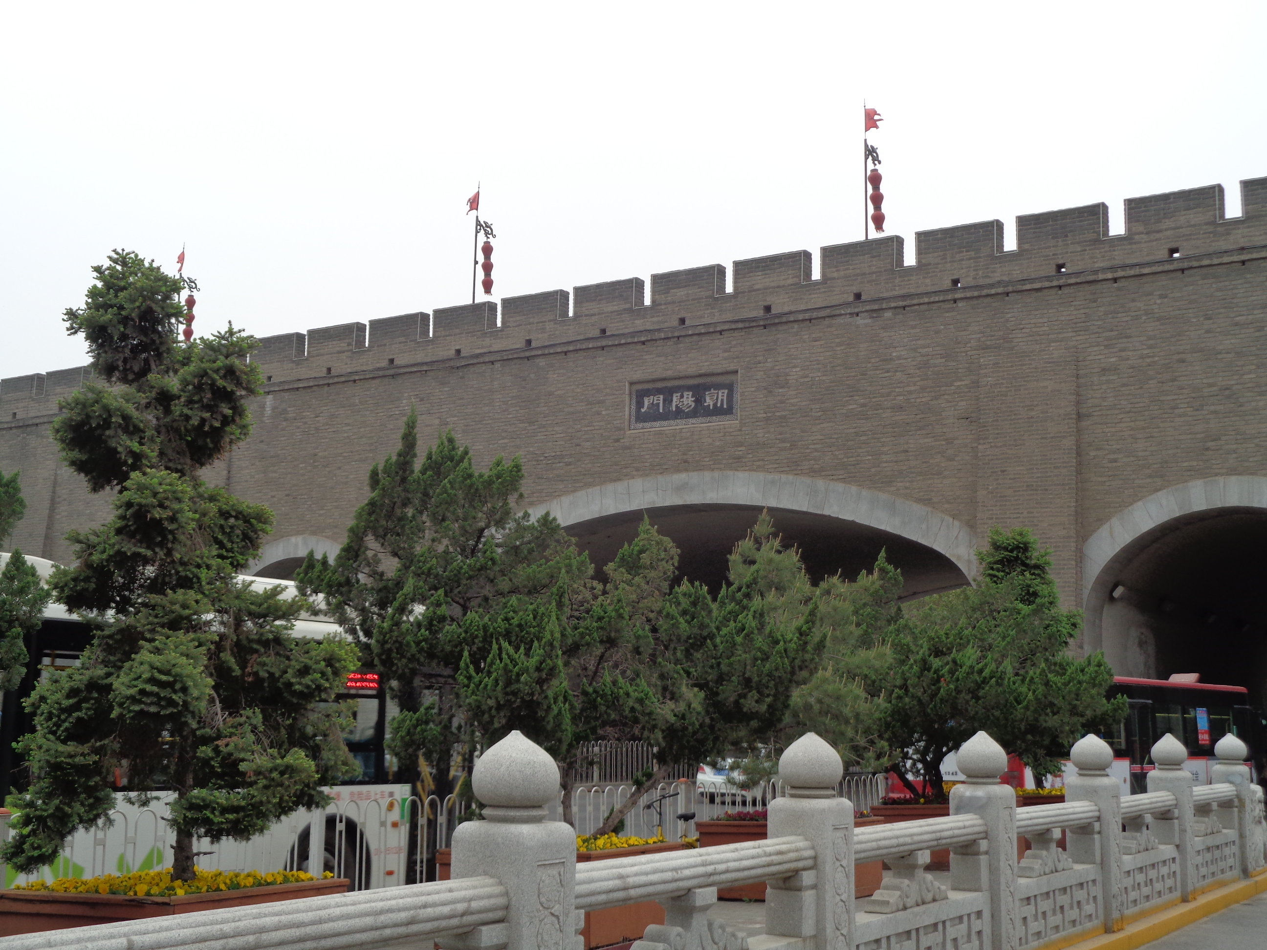 西安市西安城墙外朝阳门